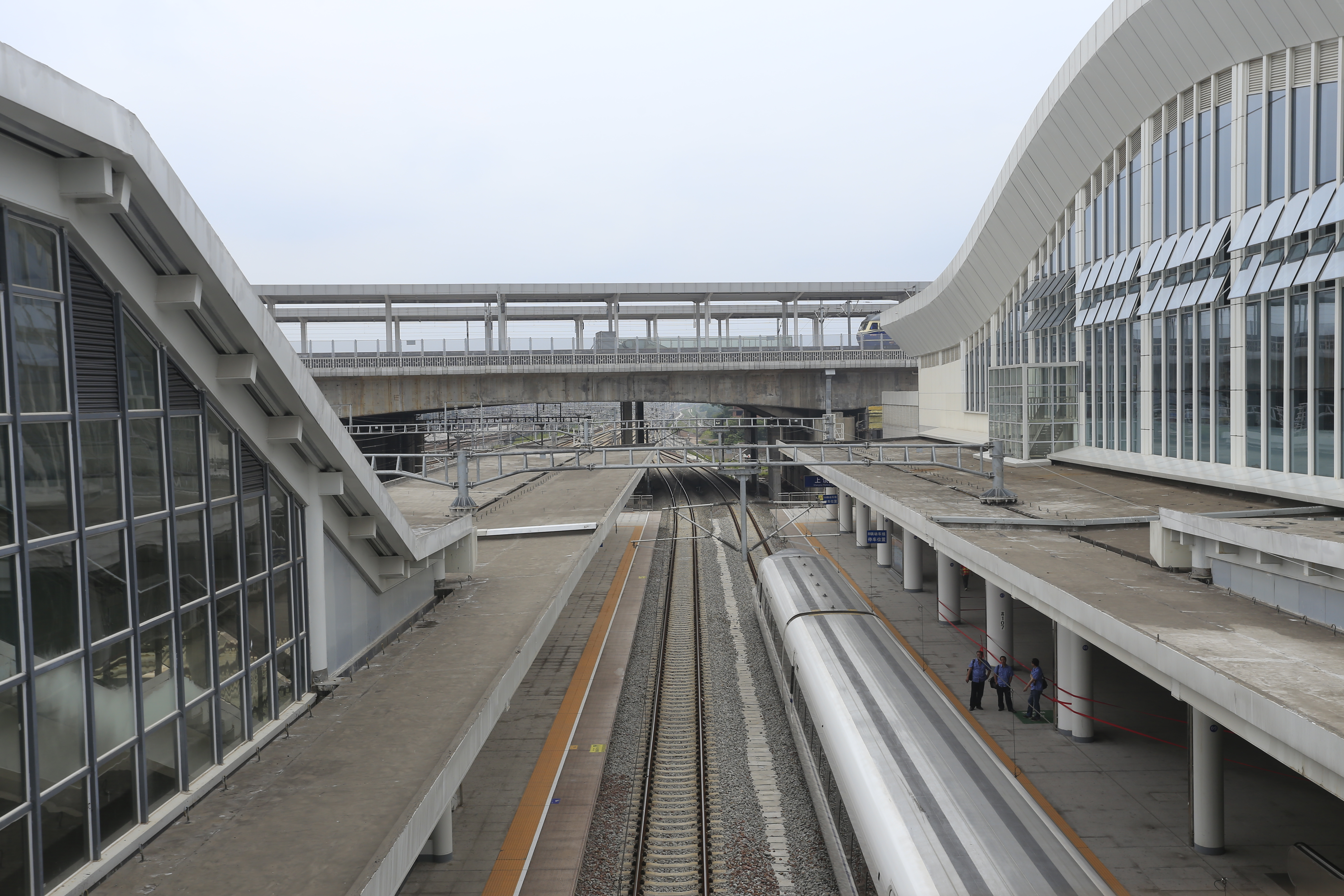 上饶火车站 沪昆高铁场